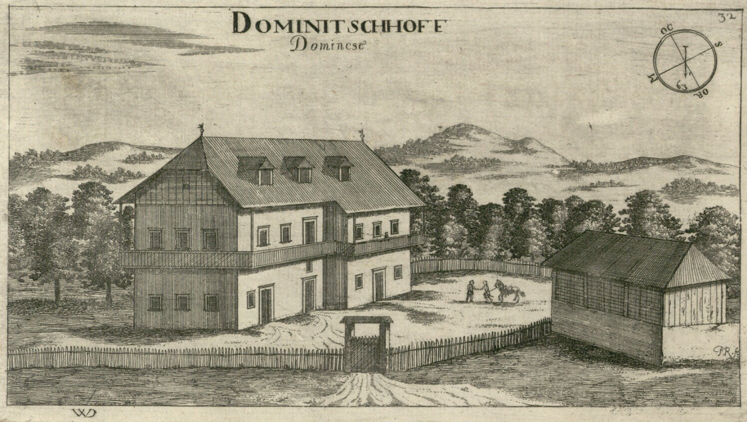 Gradič Dominiče (Dominitschhoff)